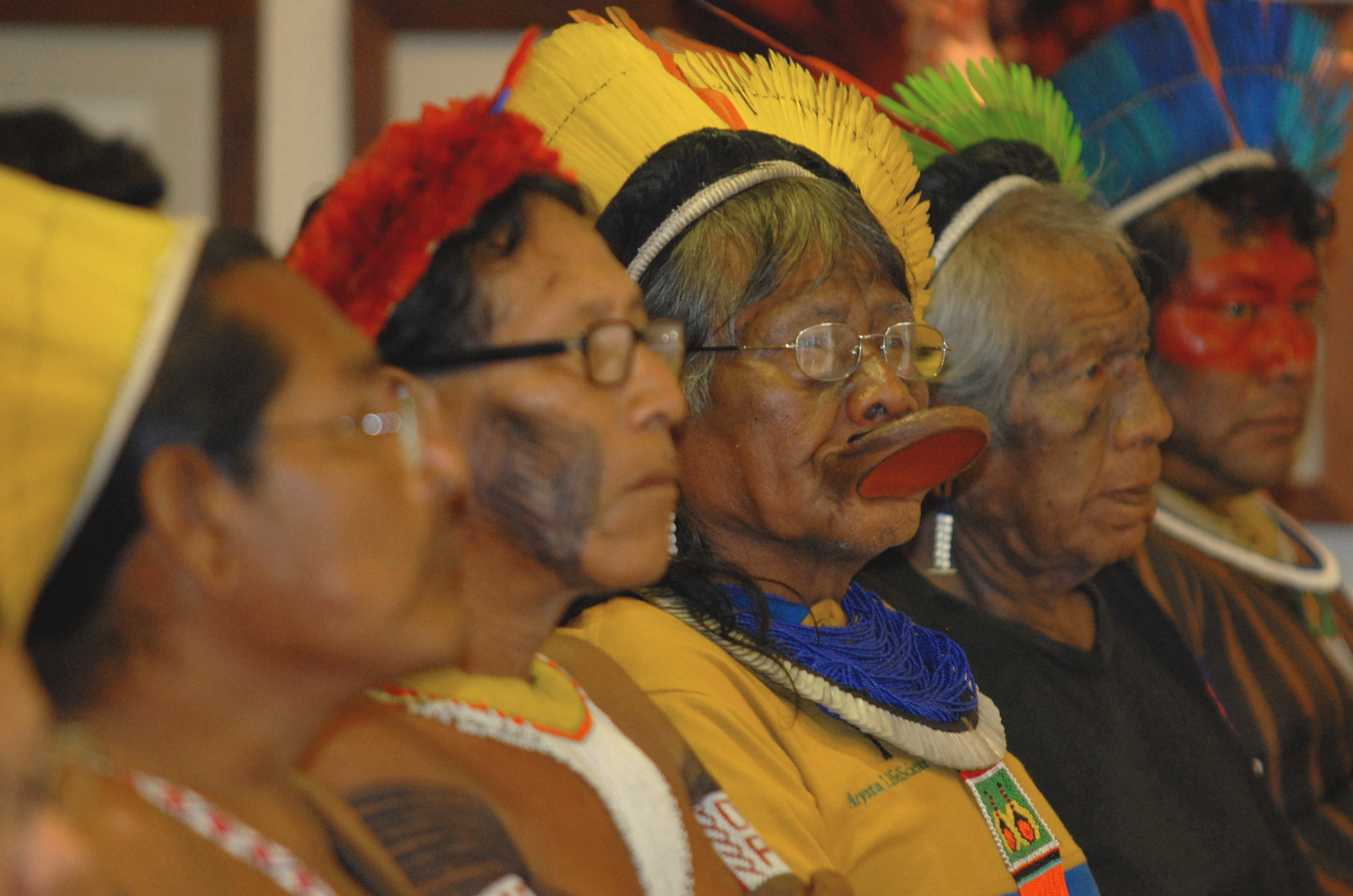 Brasília - Lideranças indígenas participam no Ministério da Justiça de cerimônia para assinatura das portarias declaratórias das terras: Cachoeirinha (MS), da etnia Terena; Guarani de Araça'I (SC), da etnia Guarani; Riozinho do Alto Envira (AC) - da etnia Ashaninka e Isolados; Toldo Imbu (SC), da etnia Kaingang; Toldo Pinhal (SC), da etnia Kaingang; Chapecó (SC), da etnia Kaingang; e Yvyporã Laranjinha (PR), da etnia Nhandeva Guarani.